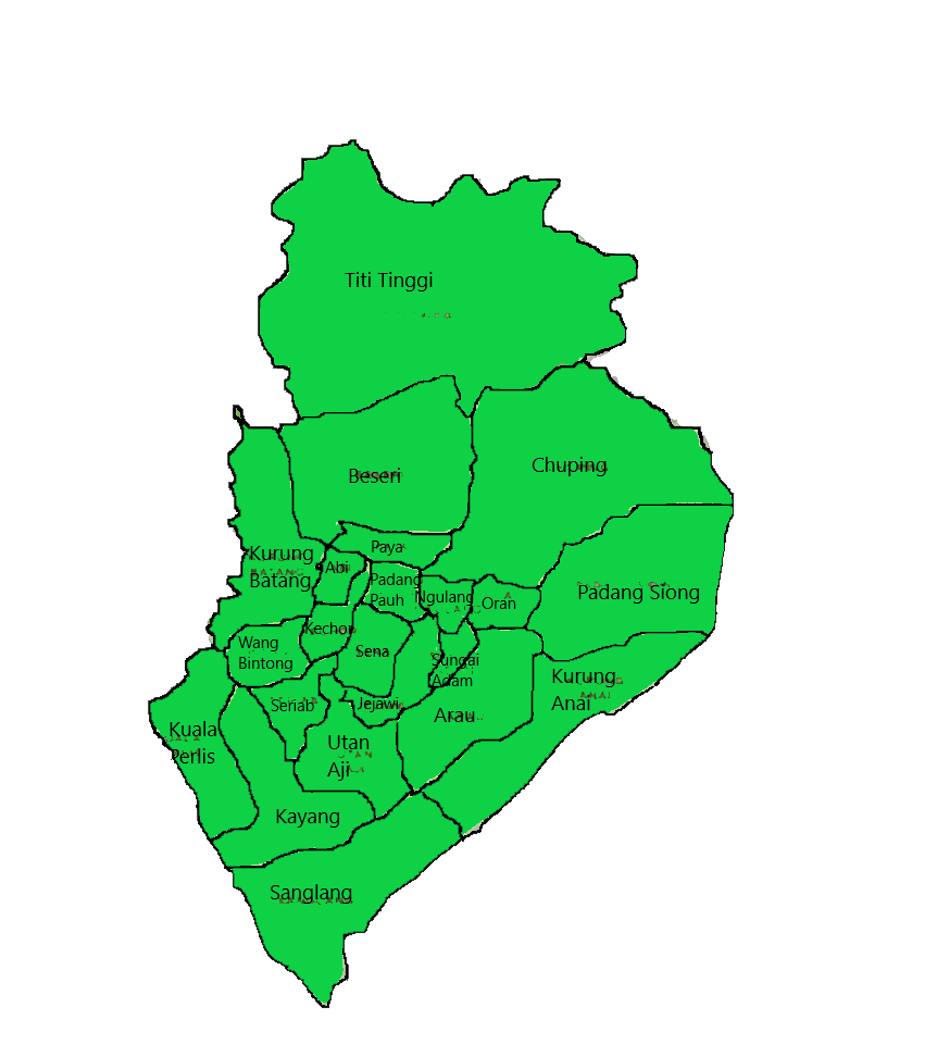 Peta kes COVID-19 mengikut mukim di Perlis